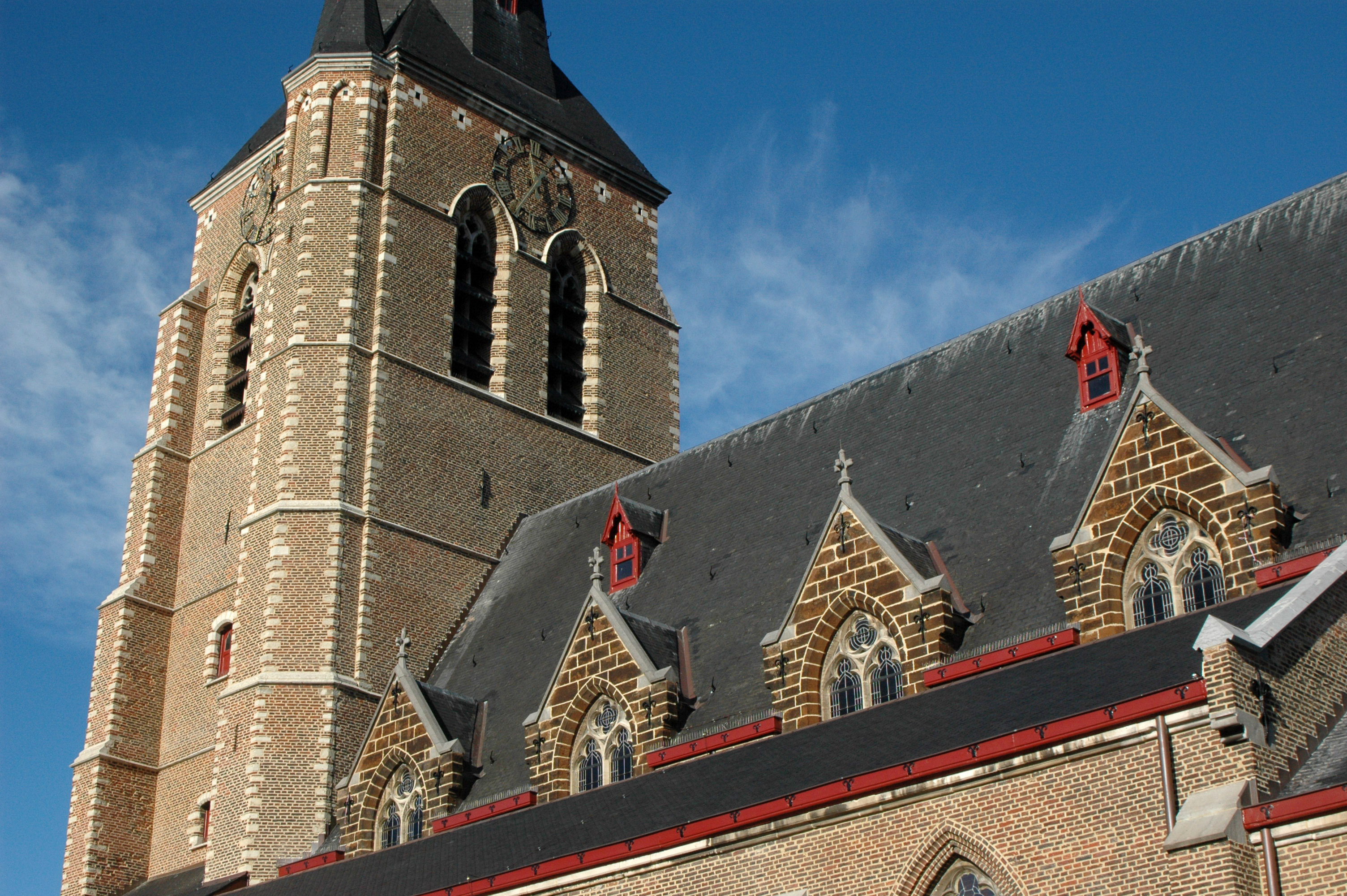 Sint-Martinuskerk in Tessenderlo (Limburg, Belgium). Foto genomen door inwoner in opdracht van het gemeentebestuur.